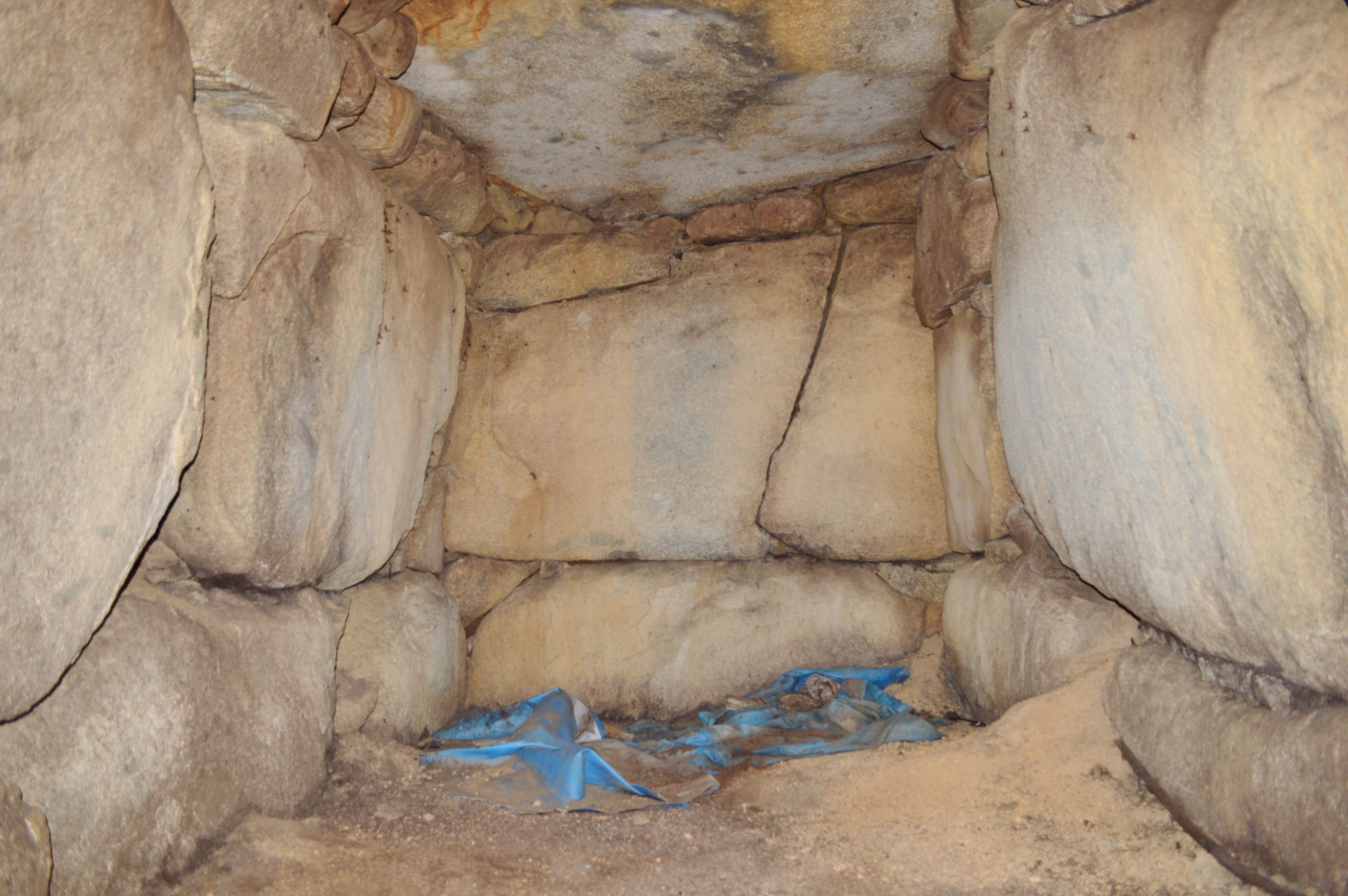 秋殿南古墳 石室玄室